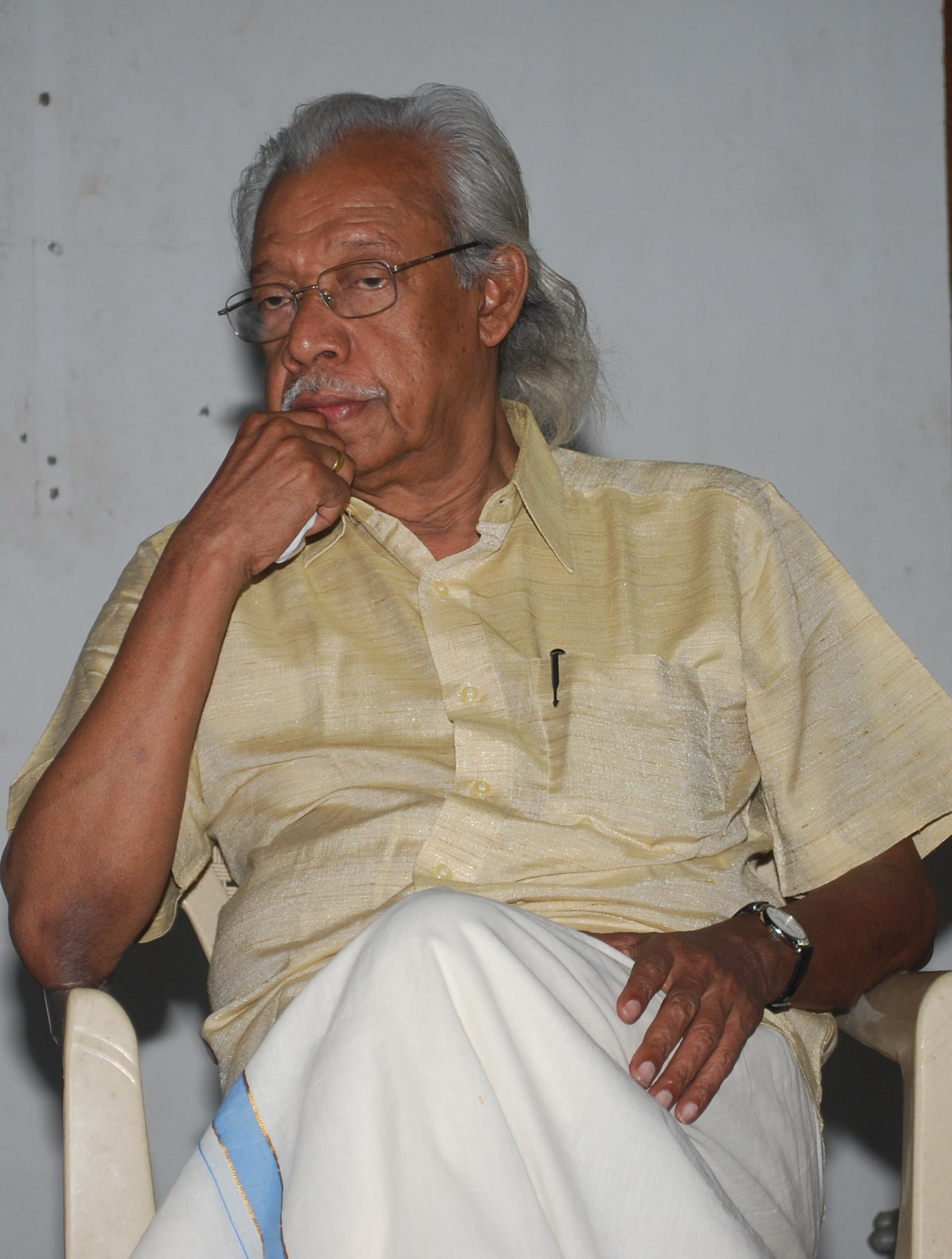 കാക്കനാടന്‍